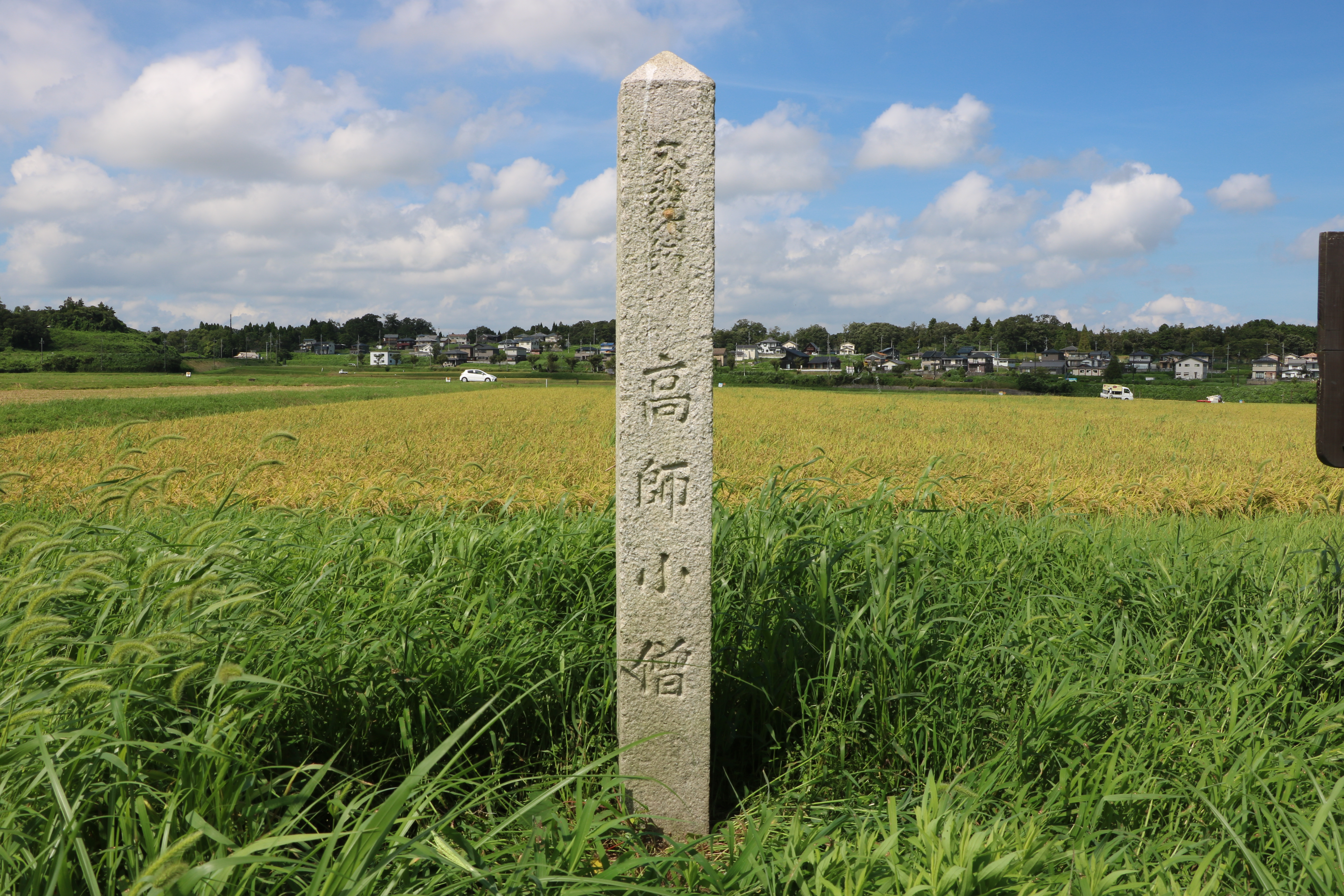 別所高師小僧（国指定天然記念物、滋賀県蒲生郡日野町）天然記念物石碑。